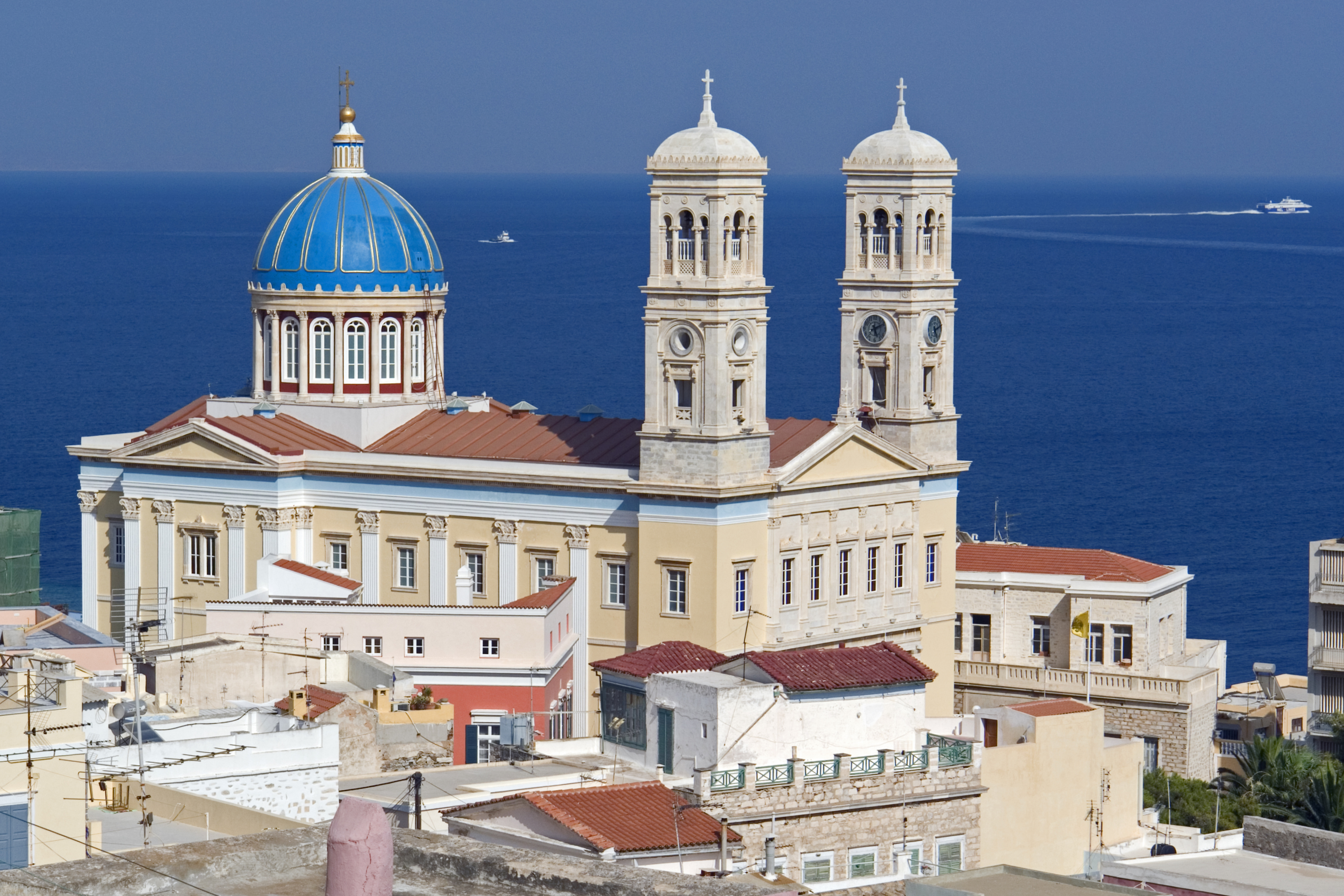 Syros, Agios Nikolaos in Ermoupolis, 19th century